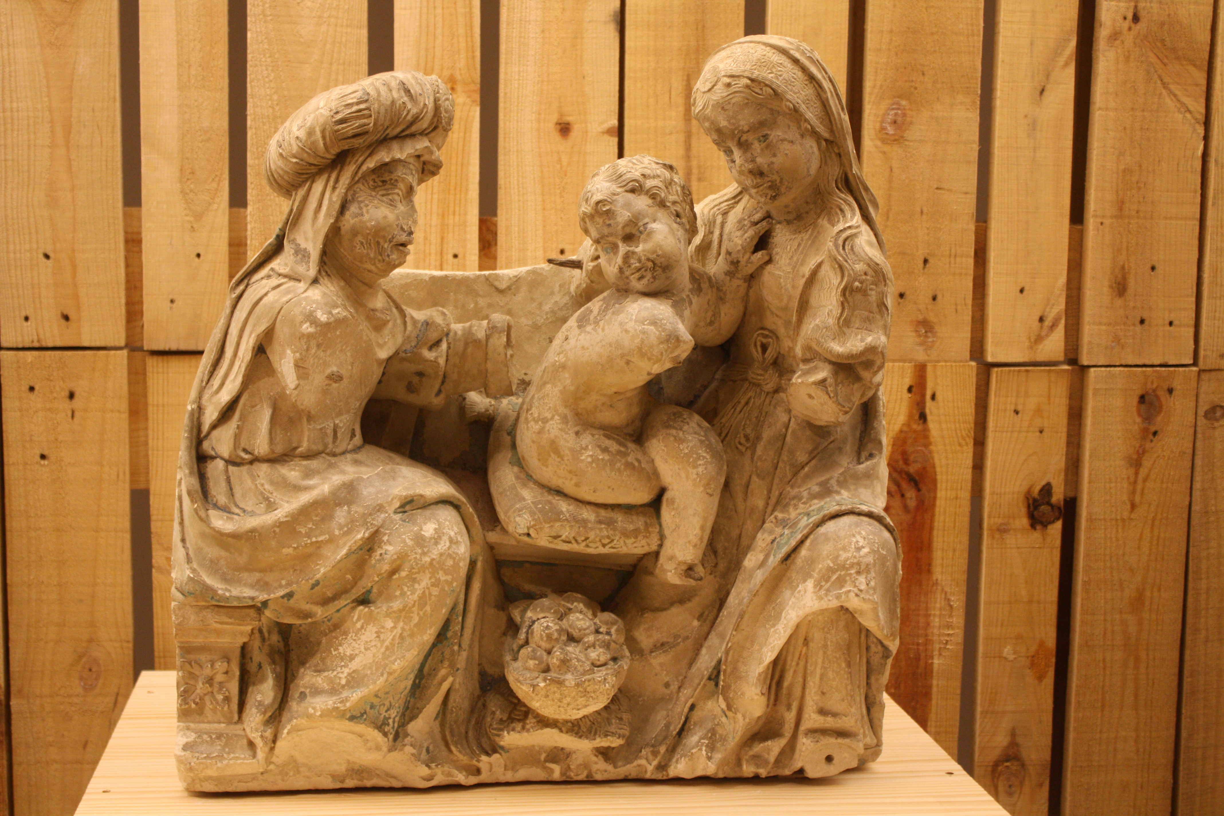 Santa Ana, a Virxe e o Neno, escultura anónima (ca. 1520) da Catedral de Tui (Pontevedra).